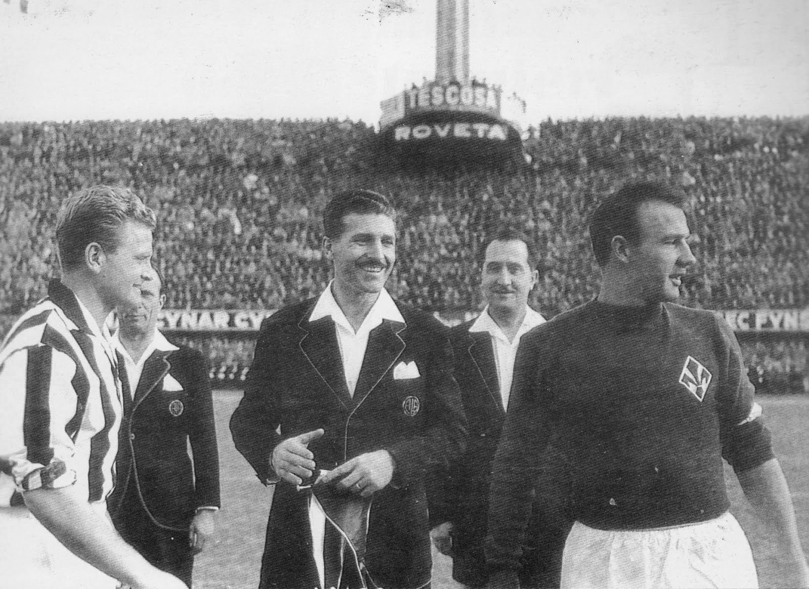 Firenze, stadio Comunale, fine degli anni 50 del XX secolo. I due capitani di Juventus e Fiorentina, rispettivamente Giampiero Boniperti (a sinistra) e Sergio Cervato (a destra), insieme all'arbitro Concetto Lo Bello (al centro), prima del fischio d'inizio di una sfida valevole per il campionato italiano di Serie A.